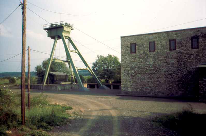 Steinsalzwerk Braunschweig-Lüneburg bei Helmstedt, Schacht Heidwinkel II